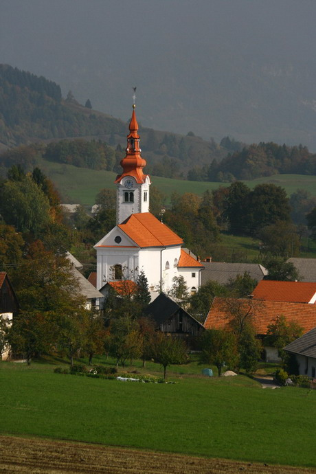 Avtor Robert Novak, 2007